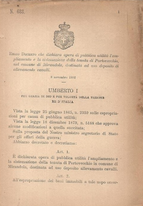 Regio Decreto che dichiara opera di pubblica utilità l'ampliamento e la sistemazione della tenuta di Portovecchio, nel comune di Mirandola, destinata ad uso deposito di allevamento cavalli